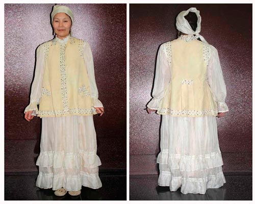 Женщина в традиционном якутском костюме (хассыат, халадаай). Снято во время выставки в 2009г.